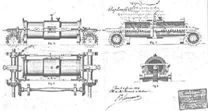 Brevetto Bersanti & Matteucci 1858